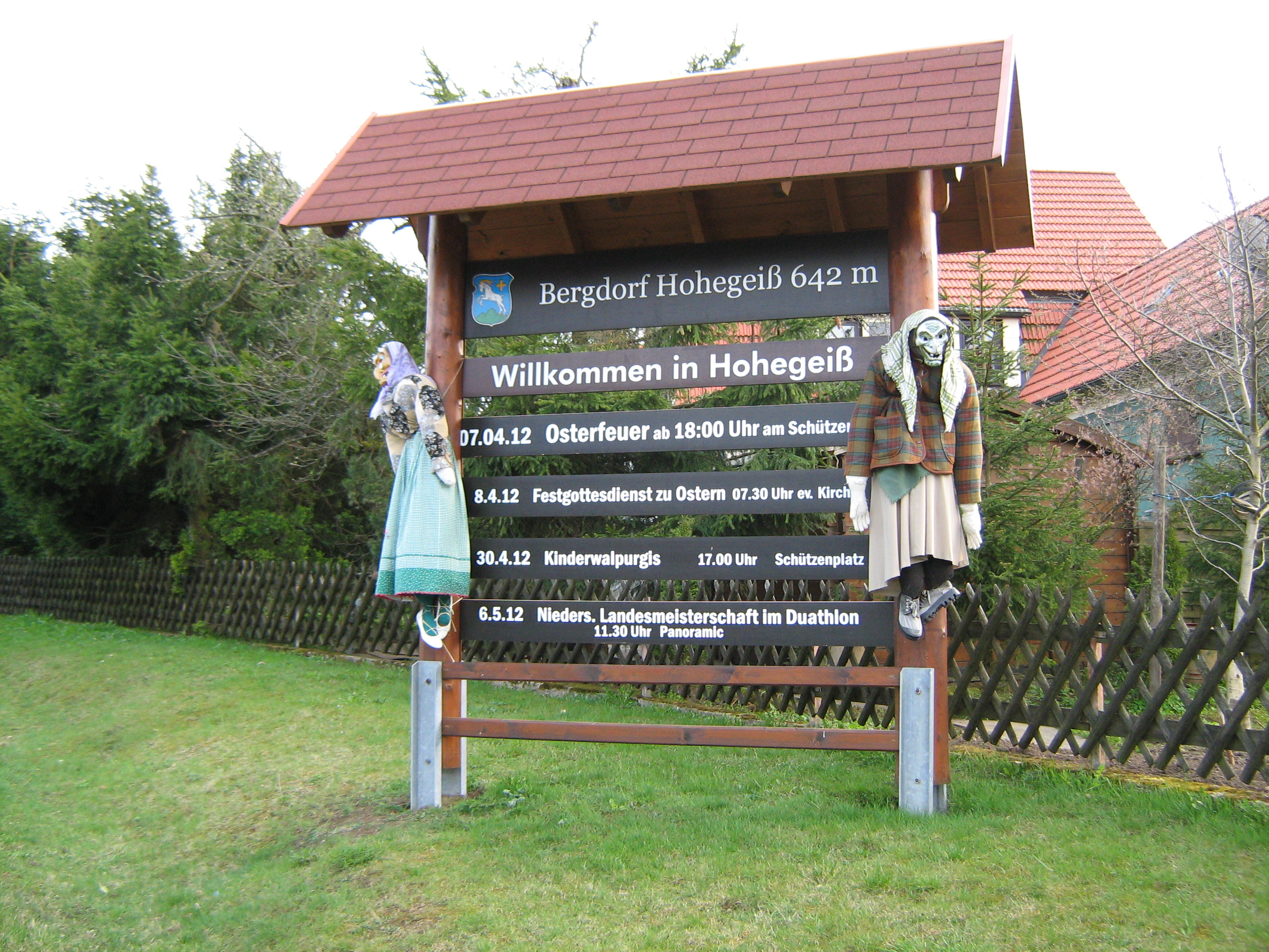 Hohegeiss byskilt dekoreret med hekse